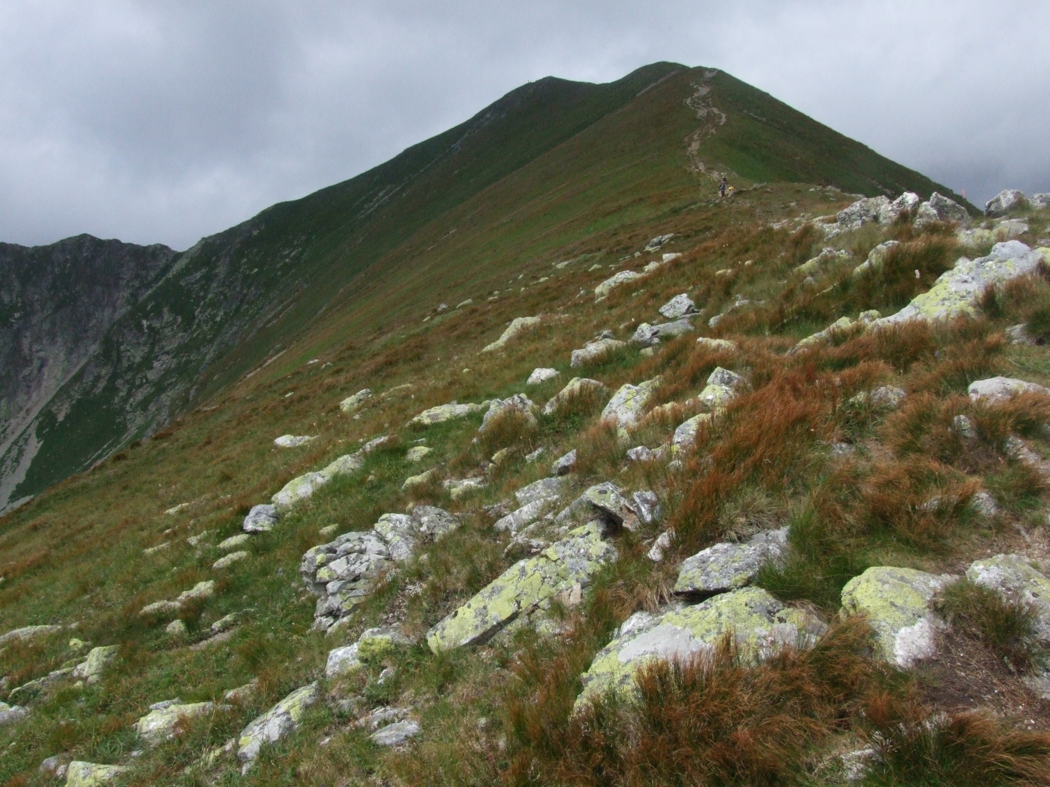 Południowo-wschodnia grań Bystej (Kobyła). Widoczny szczyt Bystrej